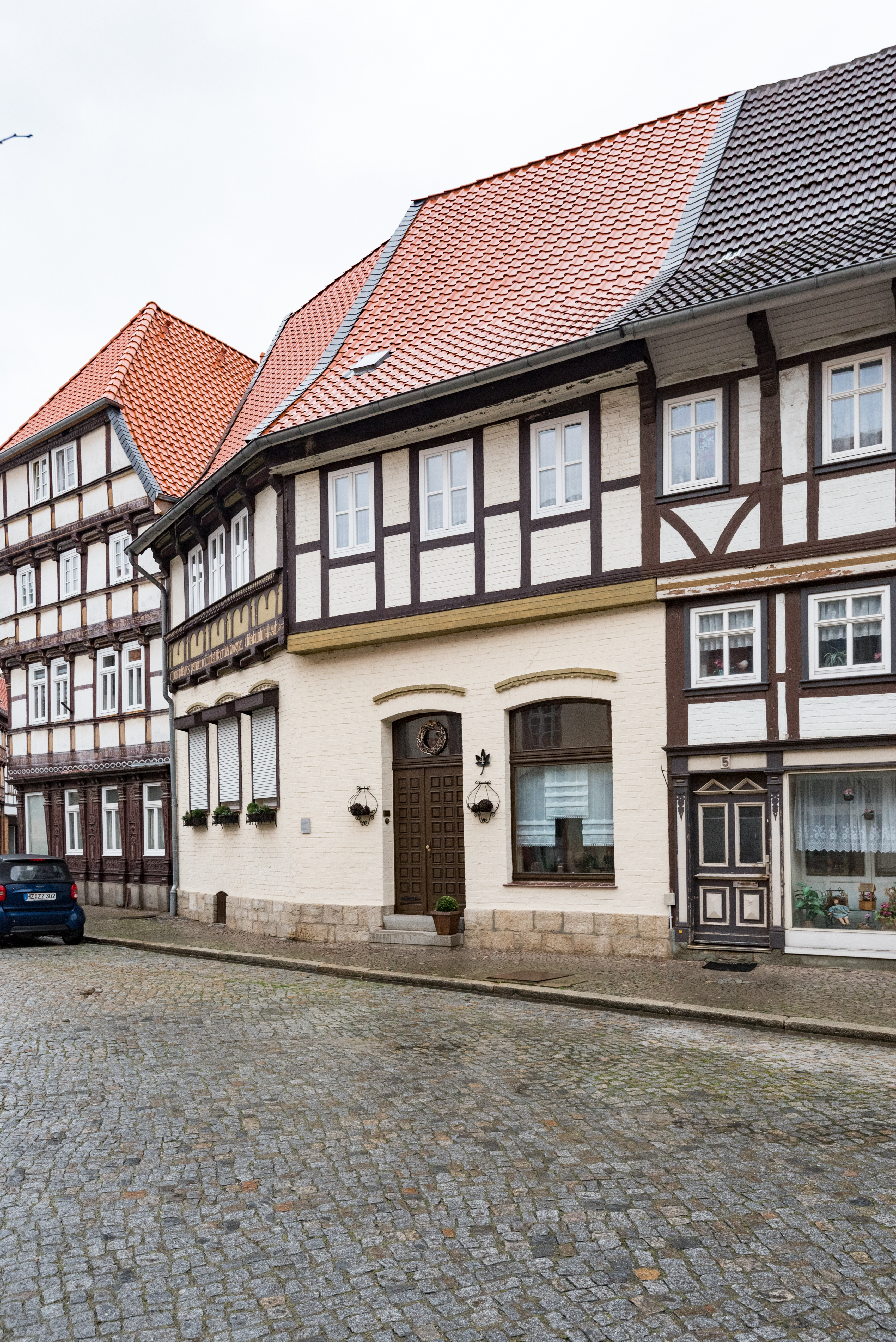 Osterwieck, Am Markt 4